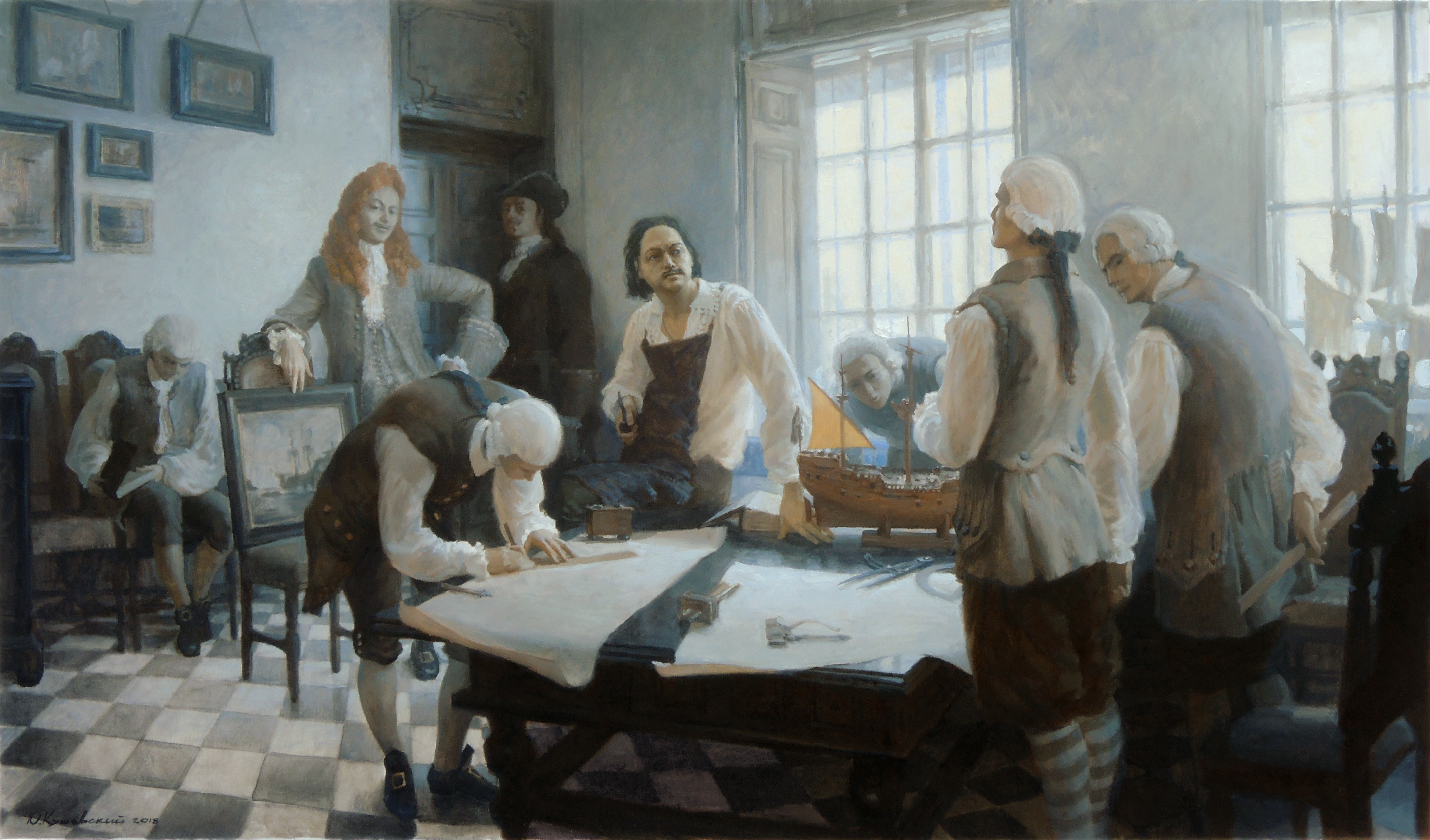 Юрий Кушевский. «Пётр I лично принимает экзамен у вернувшихся с заграничного обучения молодых дворян-"пенсионеров"». Холст, масло. 70Х120. 2018 год.